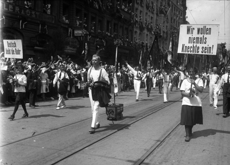 Das dreizehnte deutsche Turnfest fand unter riesiger Beteiligung von 250.000 Turnern in dem dazu festlich geschmückten München am 15. Juli 1923 statt und gestaltete sich zu einer grossen vaterländischen Kundgebung. Turner aus dem Ruhrgebiet im Festzuge.